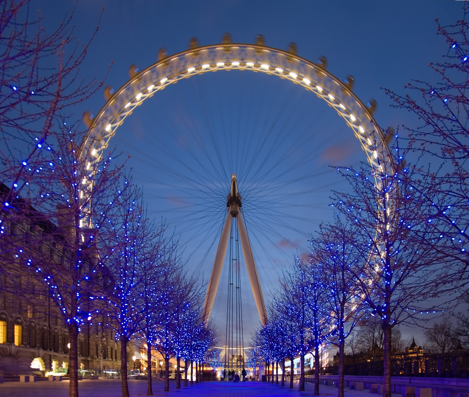 London Eye Twilight April 2006 reworked